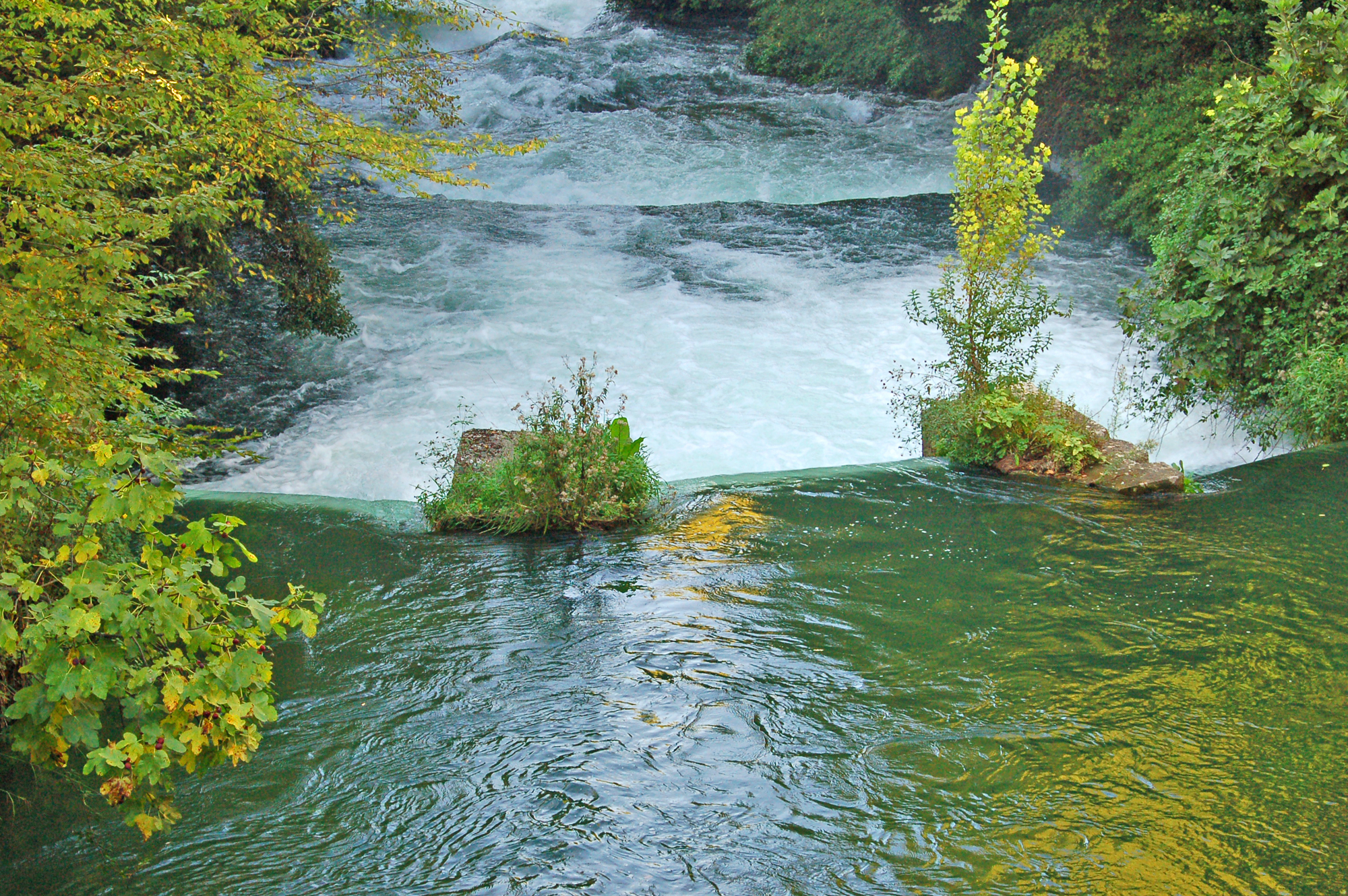 best view large